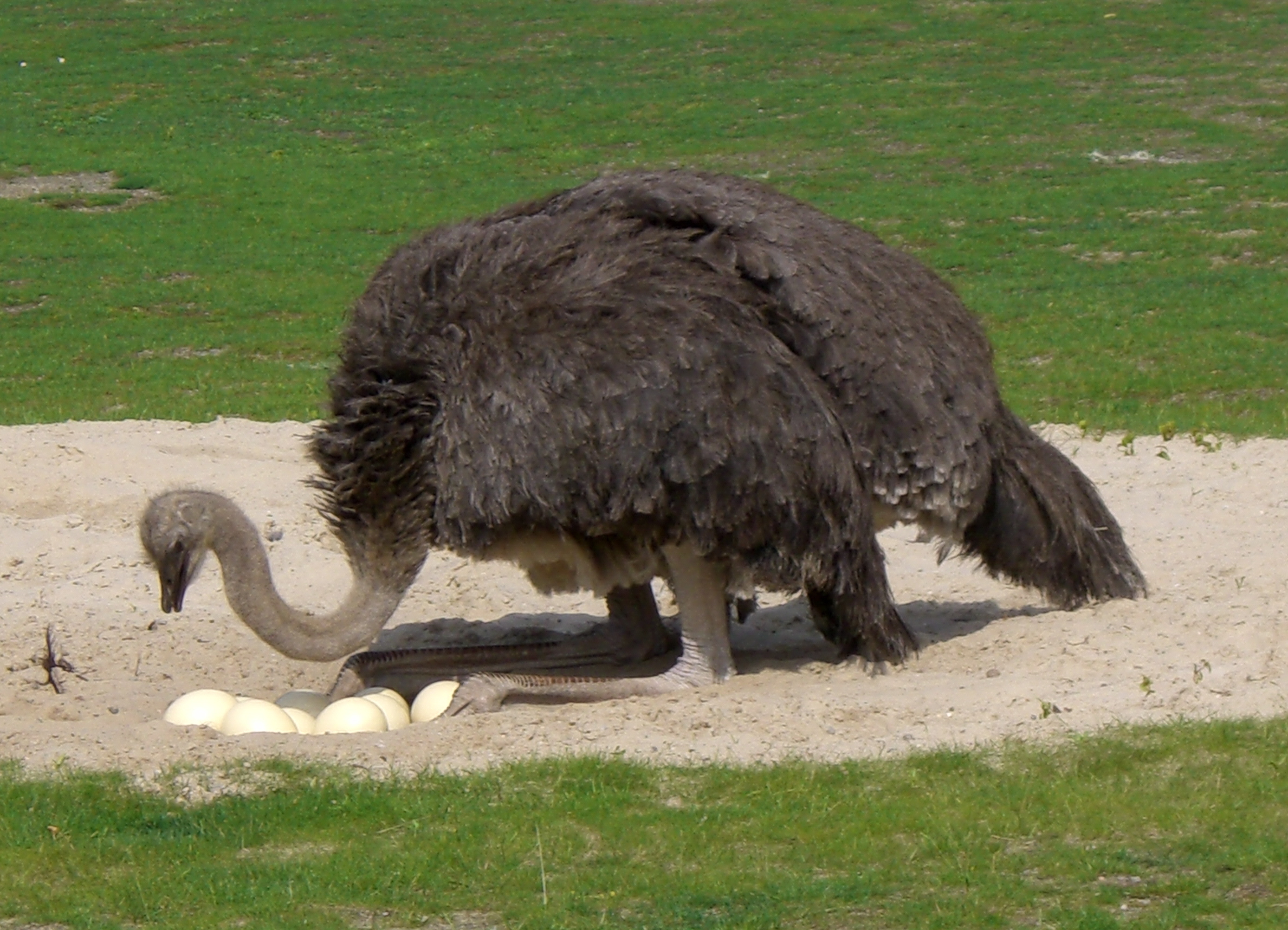 Brütender Strauß im Tierpark Berlin. Kurz zuvor war der Hahn vom Nest aufgestanden. Die Henne legt nun die Eier zurecht, bevor sie sich darauf niederlässt.